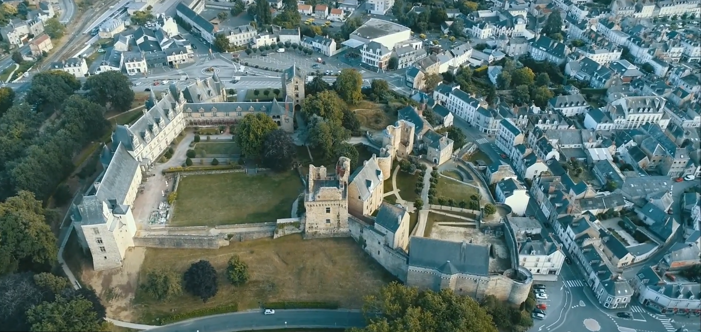 Vue aérienne du château de Châteaubriant, Loire-Atlantique, Pays de la Loire, France